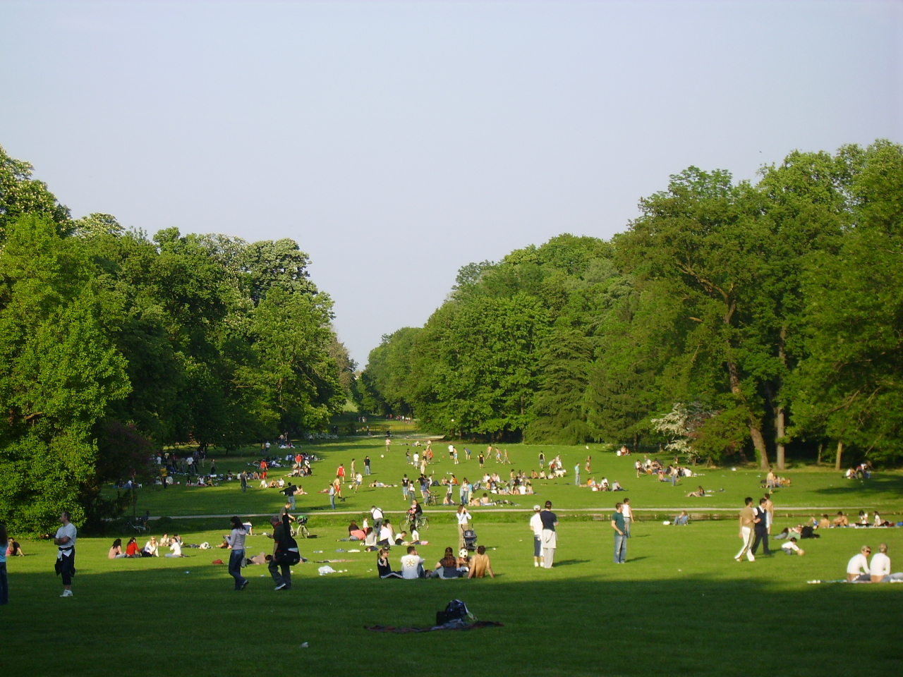 Parco della Villa Reale, Monza